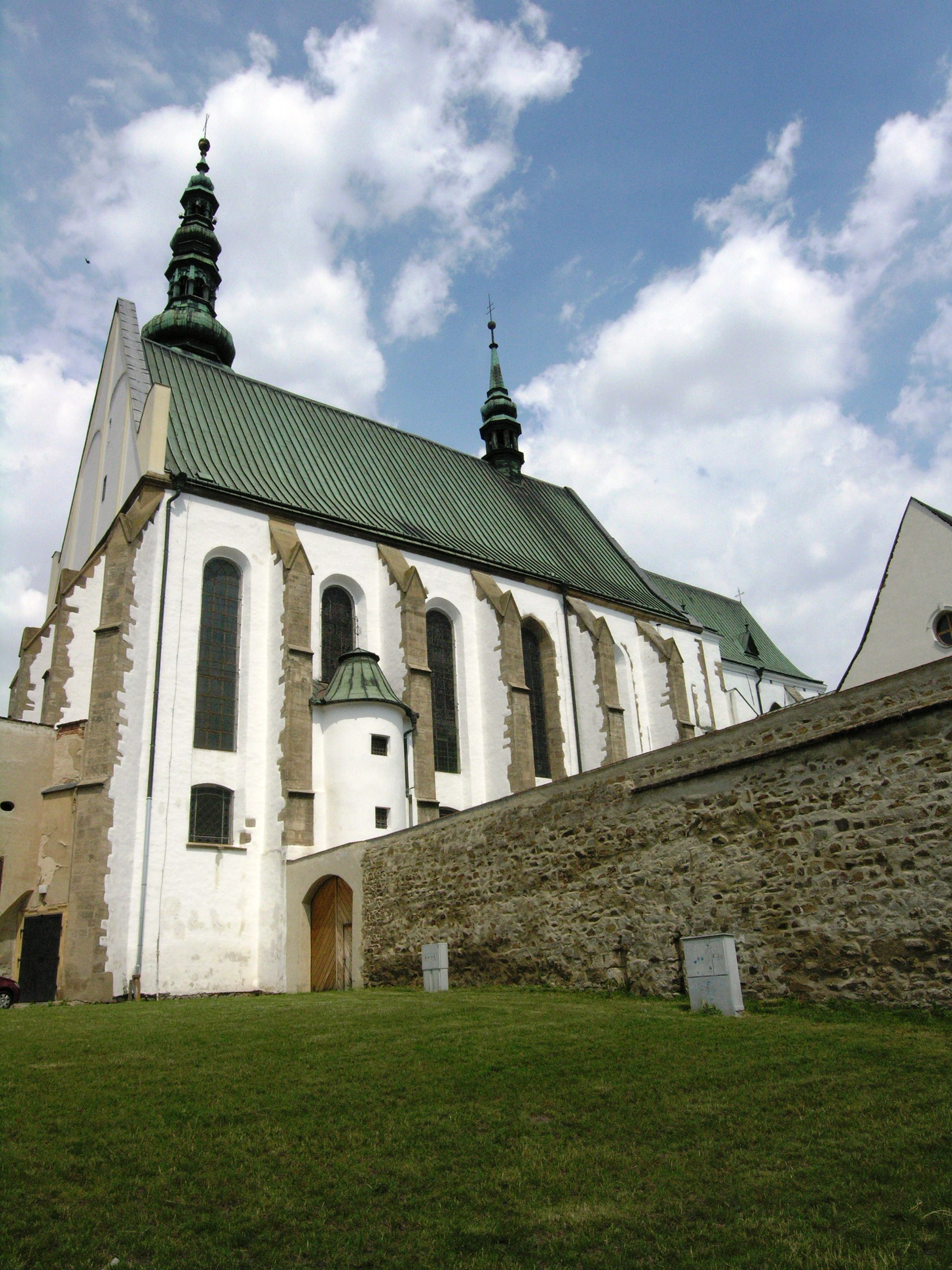 Kostel Povýšení sv. Kříže (Prostějov), nám. Filipcovo, Prostějov